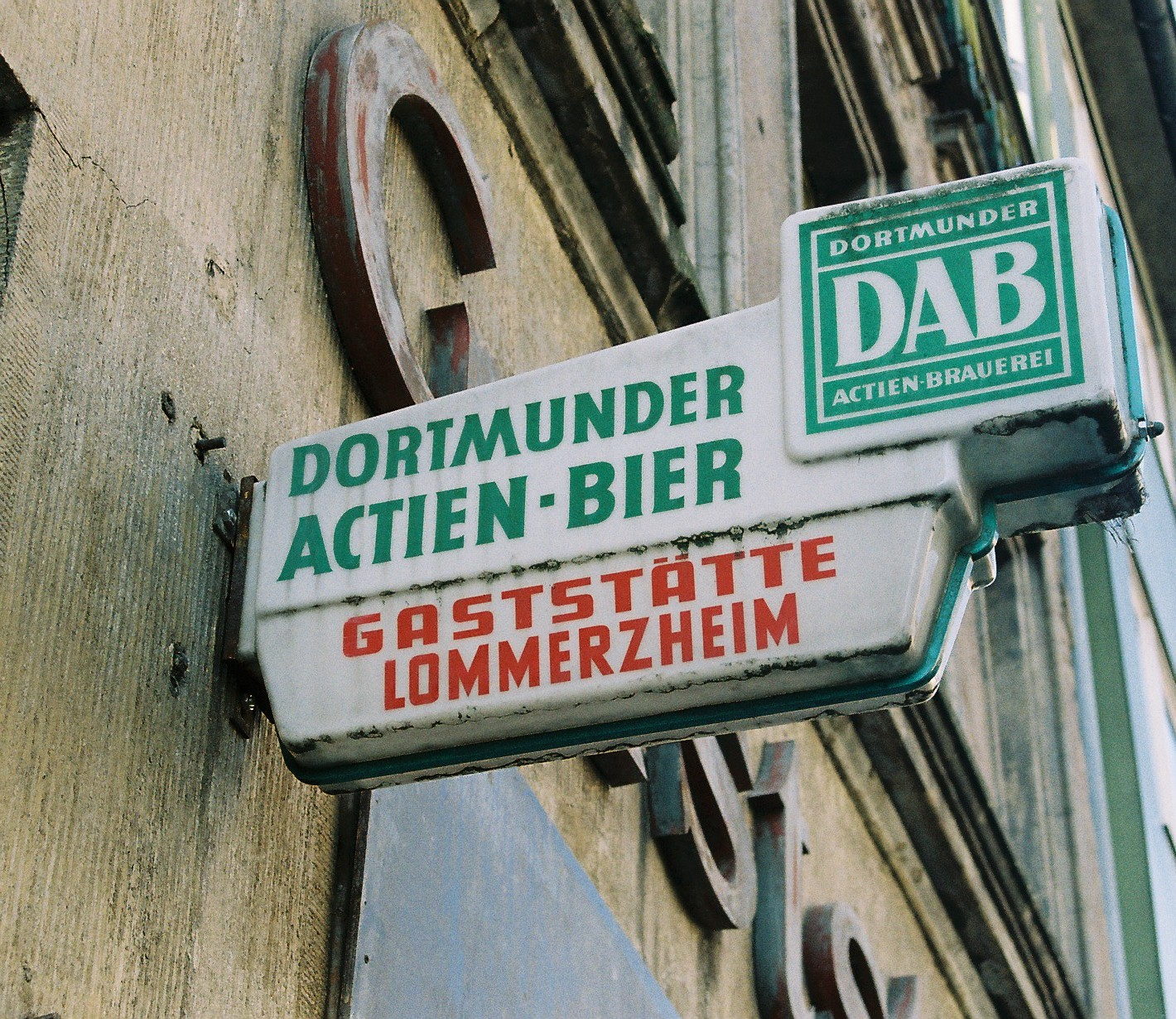 ehemalige Gaststätte „Lommerzheim“, Köln-Deutz